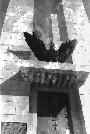 廣州市新一軍印緬陣亡將士公墓四柱紀念塔，可見銅鷹。